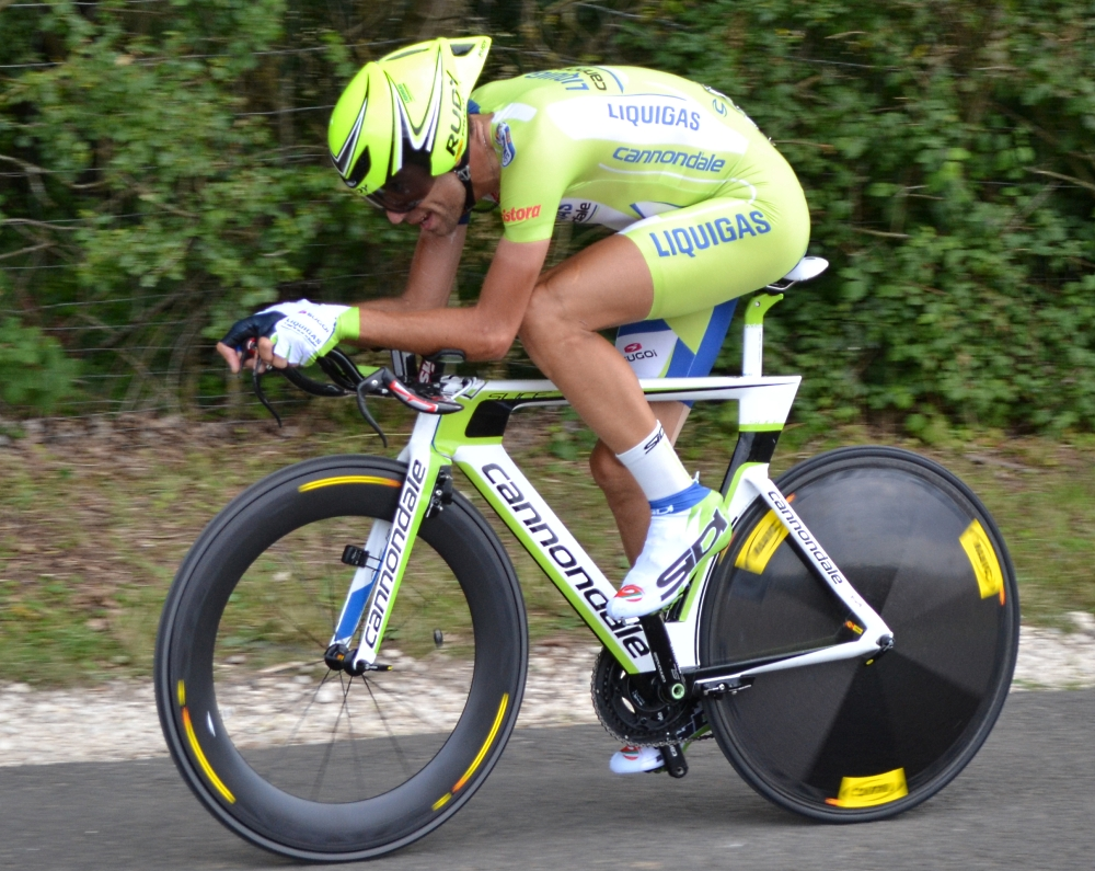 Vincenzo Nibali TDF2012